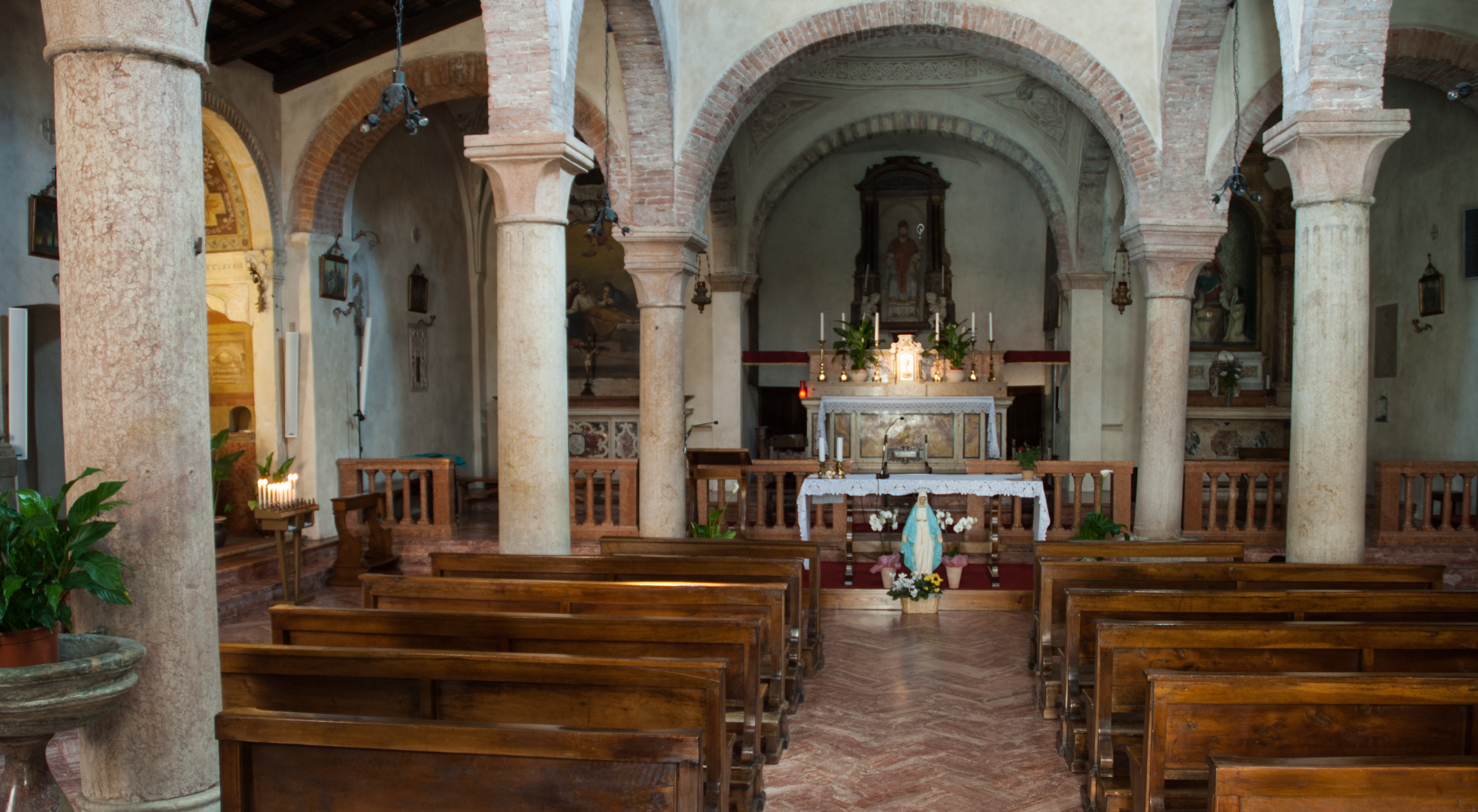 Chiesa di San Zeno in Oratorio Verona, dentro